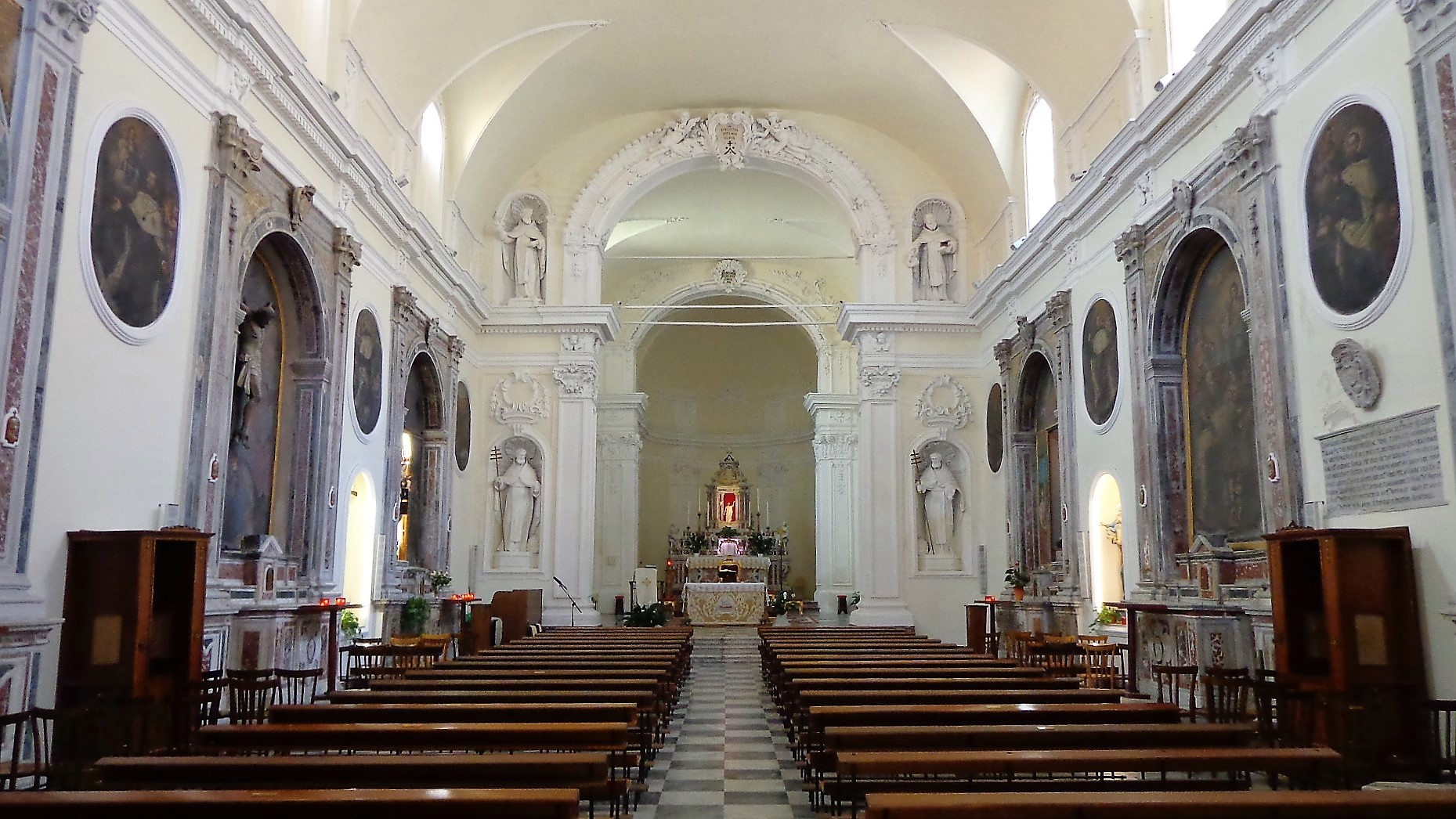 Navata